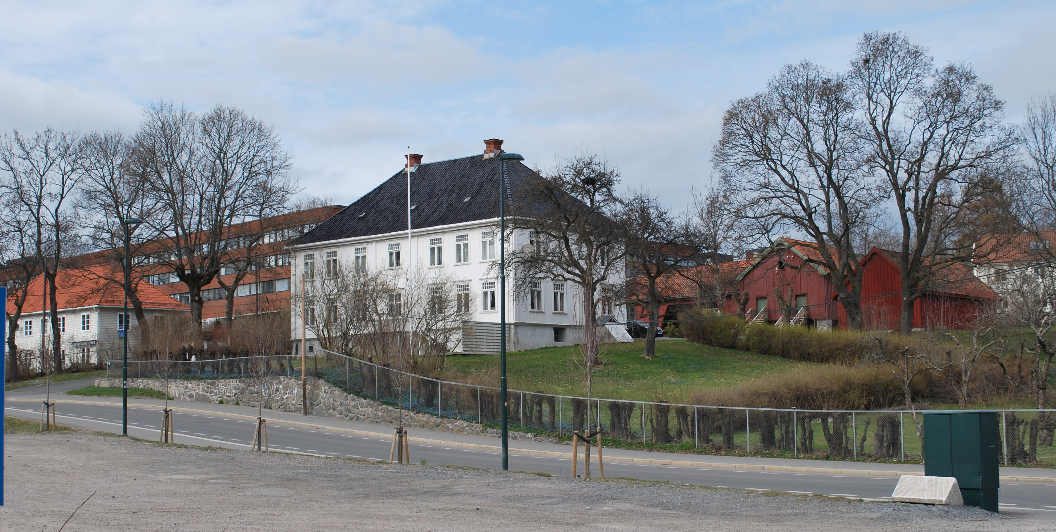 Nedre Blindern gård sett fra Blindernveien